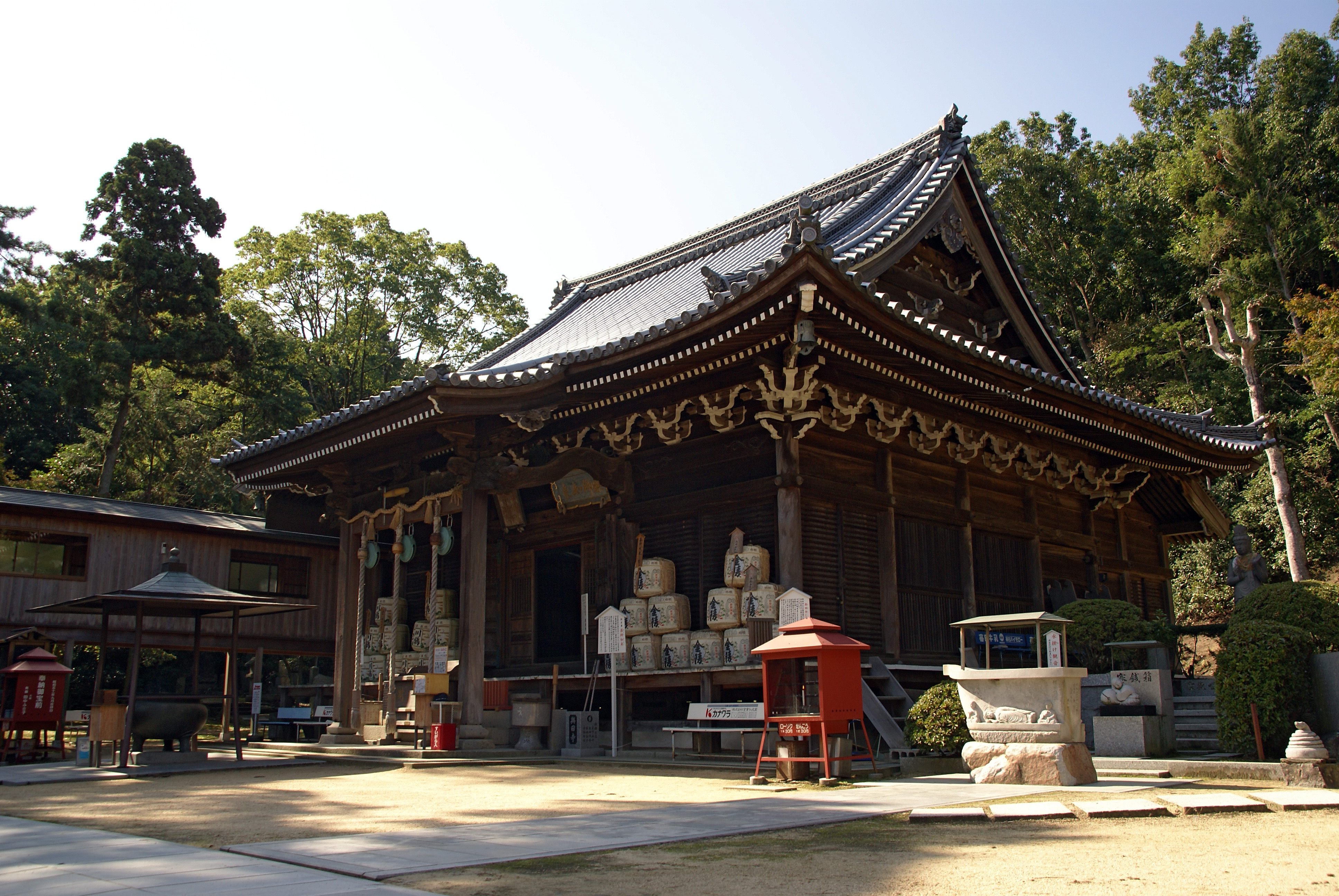 Yodaji in Higashikagawa, Kagawa prefecture, Japan